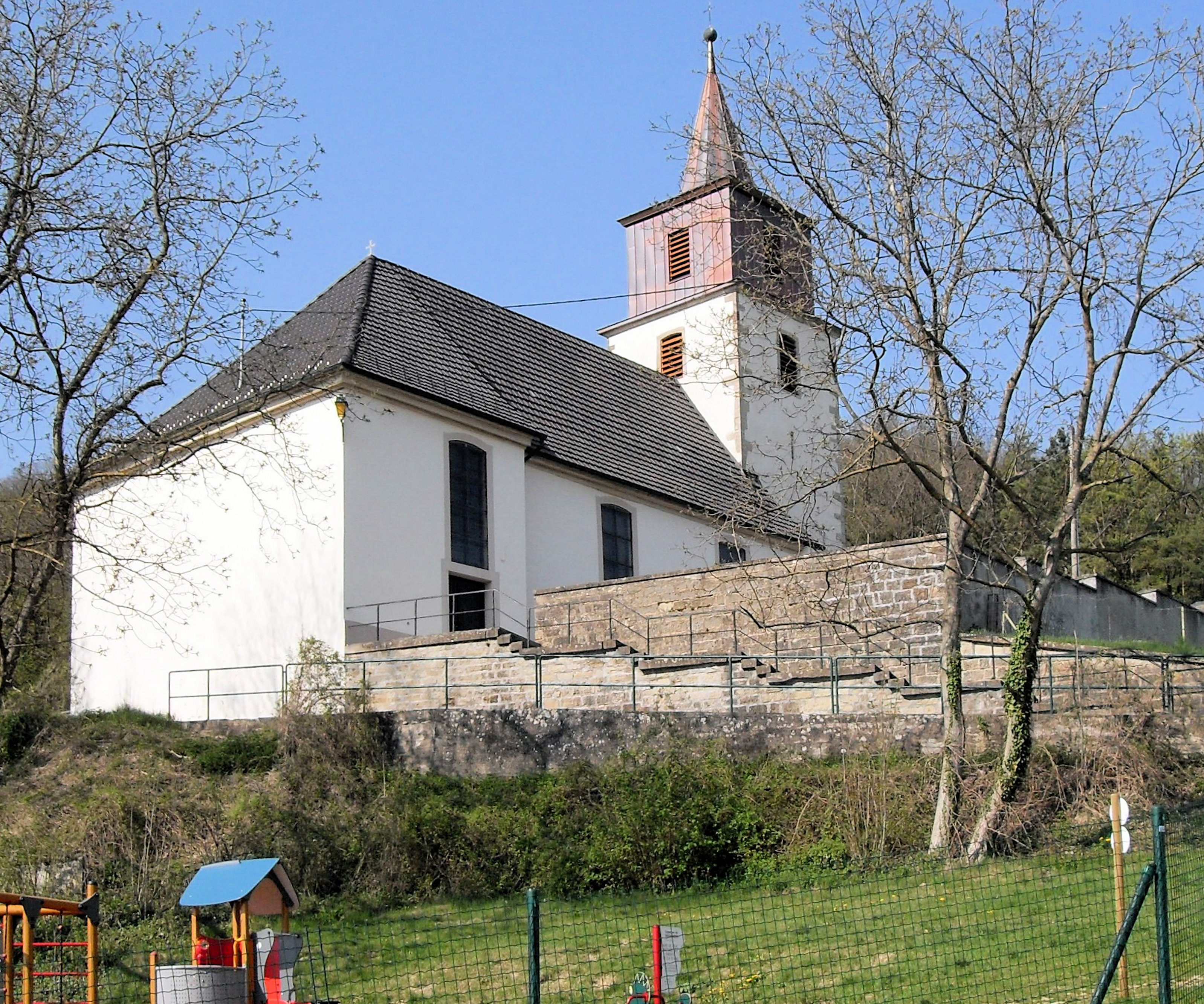 L'église Saint-Léger à Tagolsheim